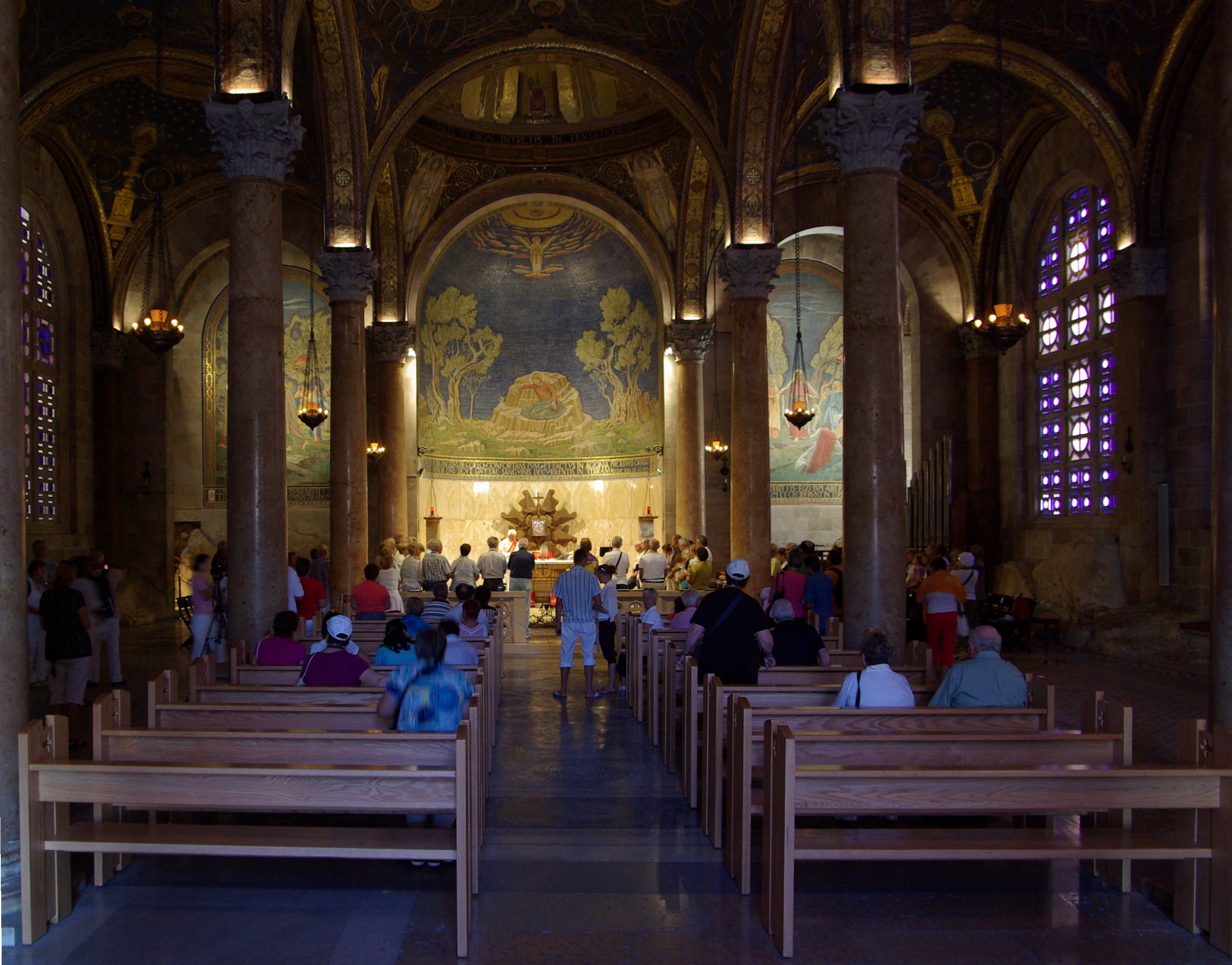 Jerusalem, Ölberg, Kirche aller Nationen